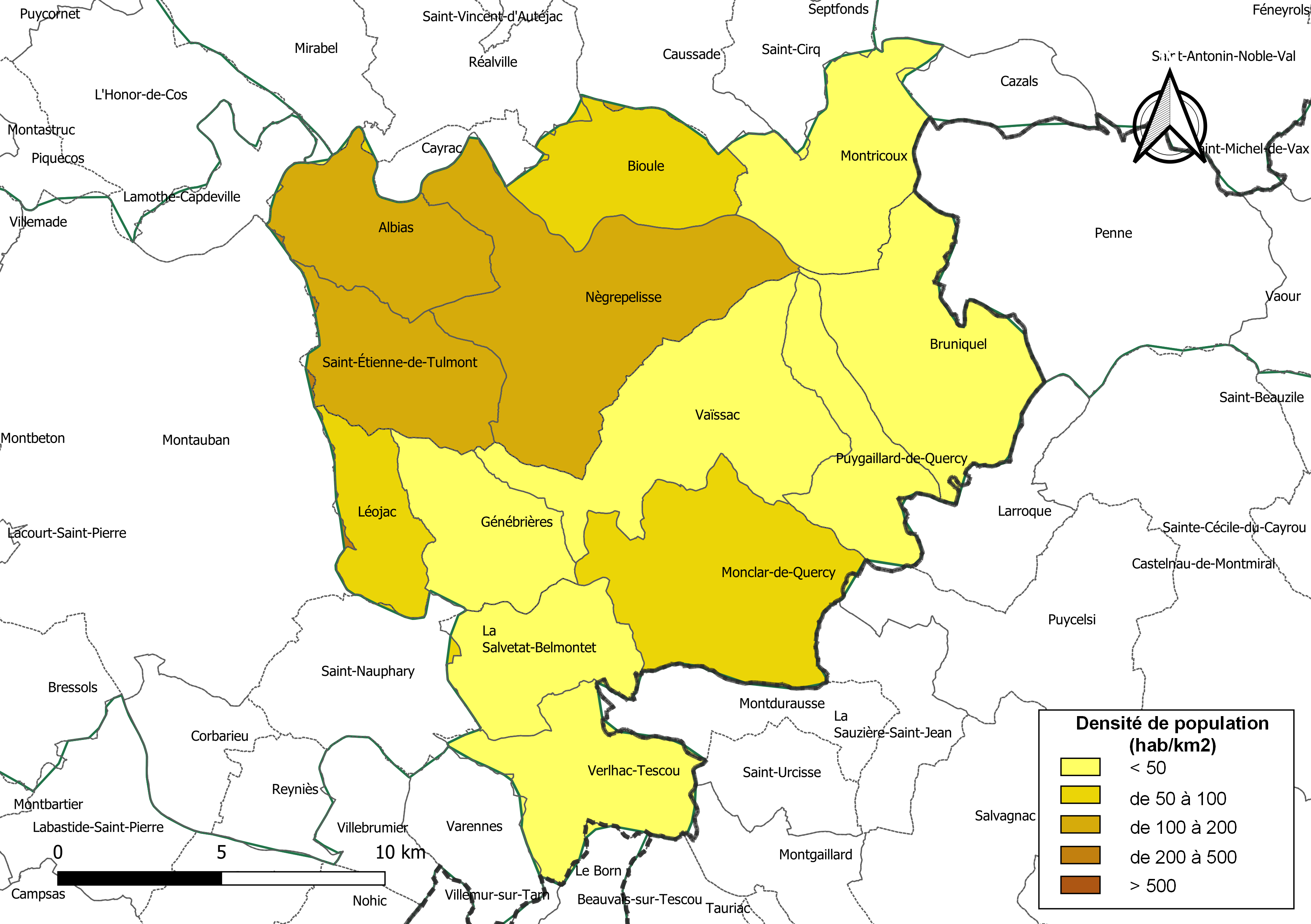 Carte des densités de population (millésimée 2016) des communes de la Communauté de communes Quercy Vert-Aveyron, département de Tarn-et-Garonne, France. Composition au 1er janvier 2019.